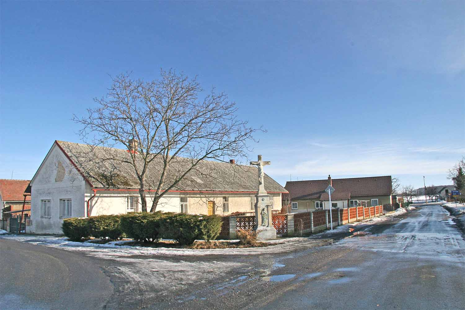 Boží muka v Chudeřicích